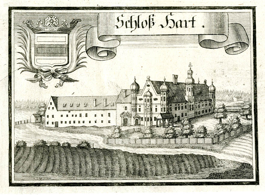 "Schloß Hart” (Hart an der Attl in Edling bei Wasserburg am Inn), aus : Beschreibung des Churfürsten- u. Hertzogthumbs Ober- und Nidern Bayrn. Rentamt München, 2. Auflage um 1750 (1. Auflage von 1701)